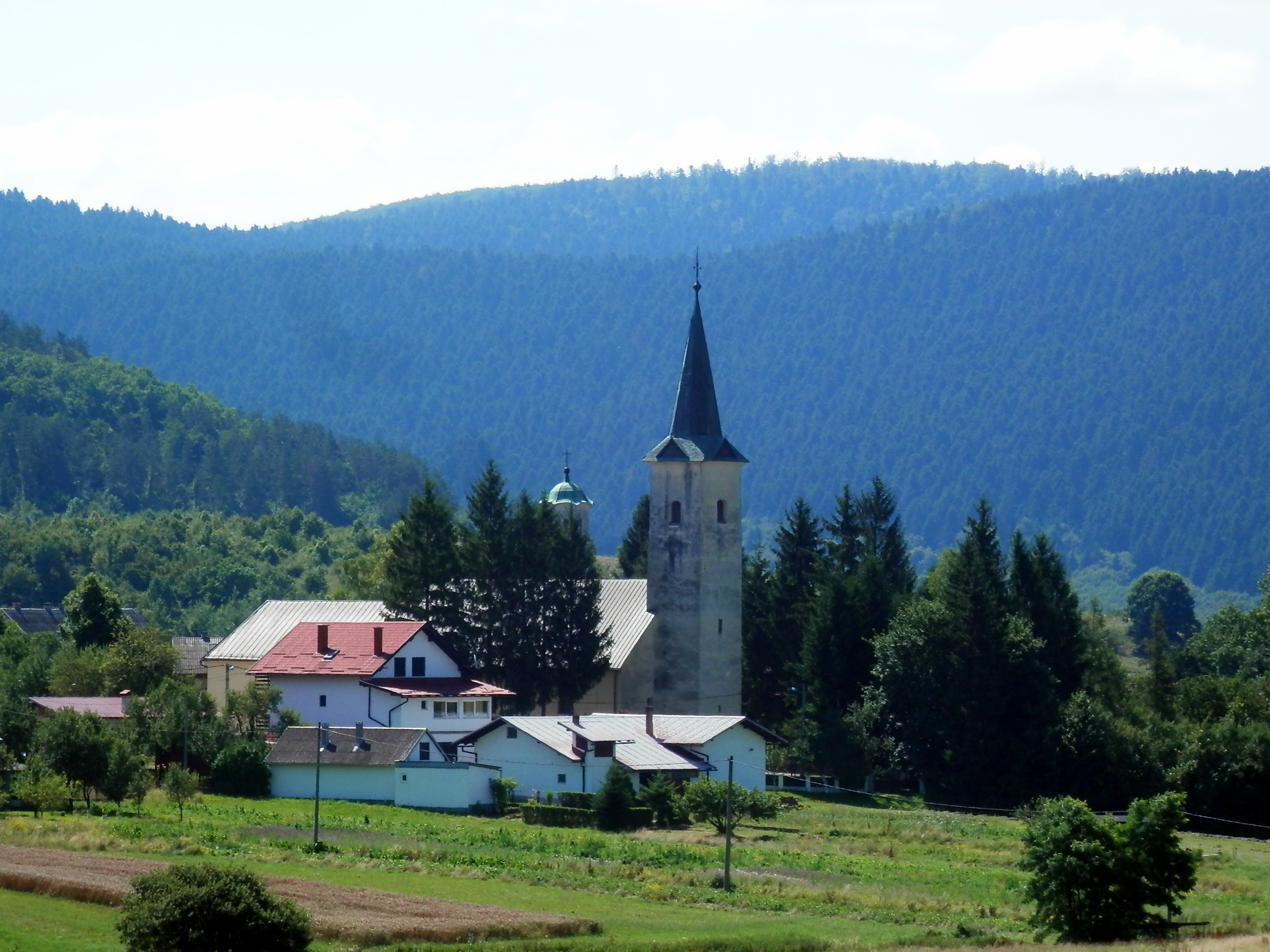 Okolie pri diaľničnom odpočívadle Brinje na chorvátskej diaľnici A1. Chorvátsko. Leto 2016